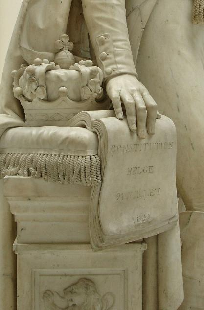 Detail Beeld Leopold I